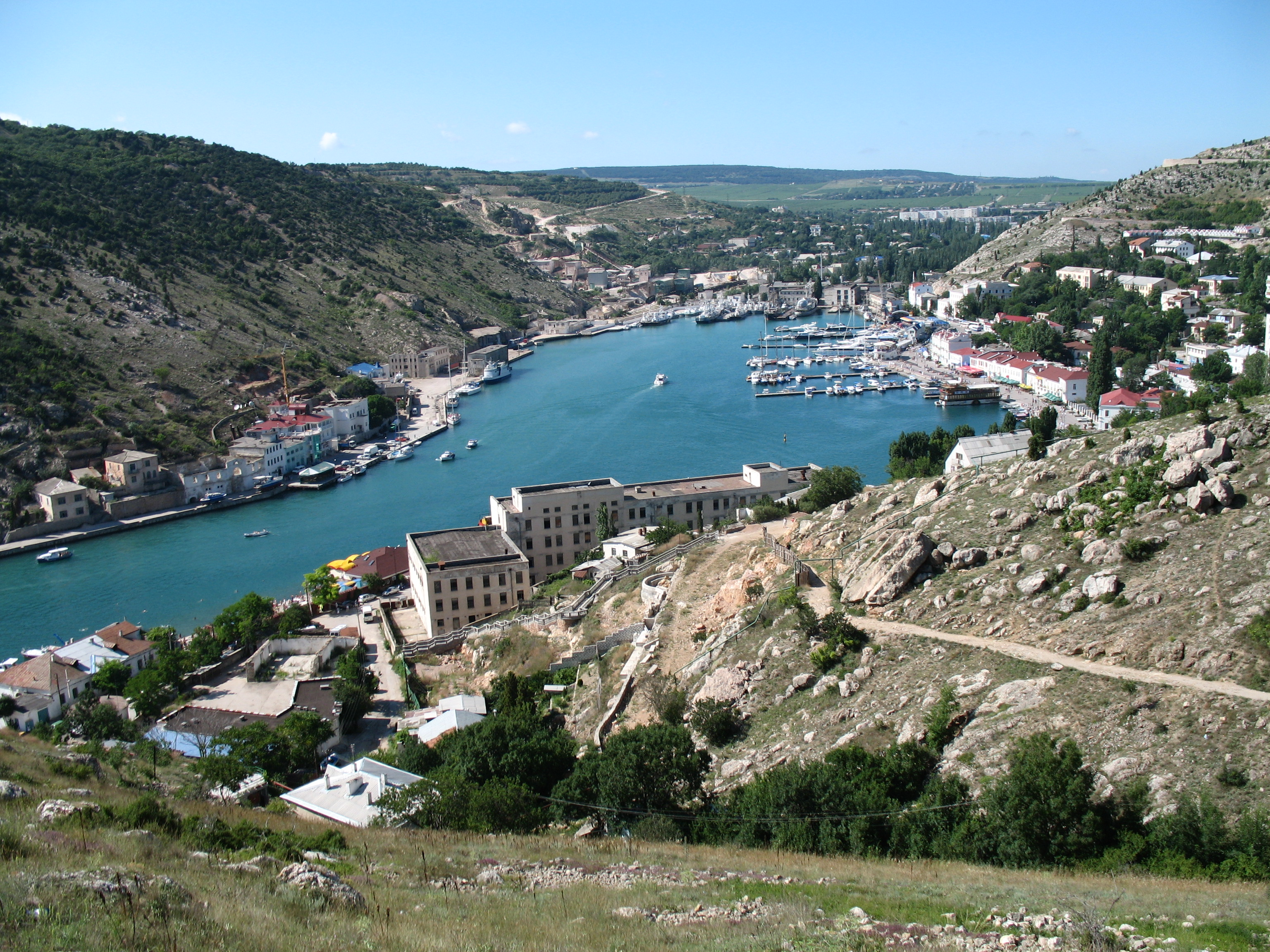 Today's Balaklava - Gulf of Balaklava